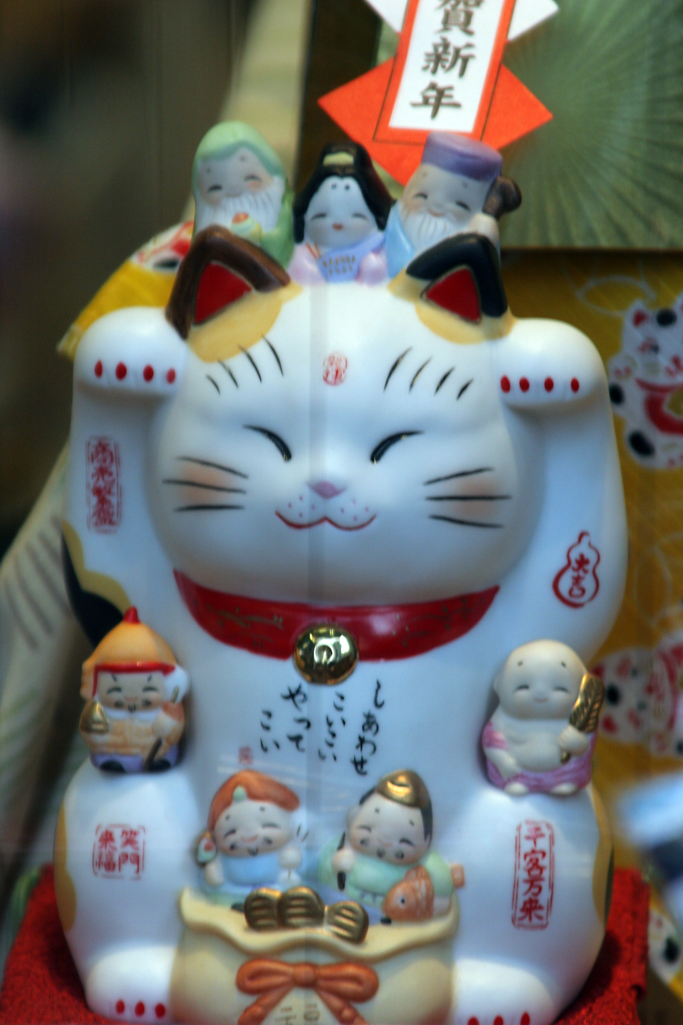 Asakusa, Tokyo Japan